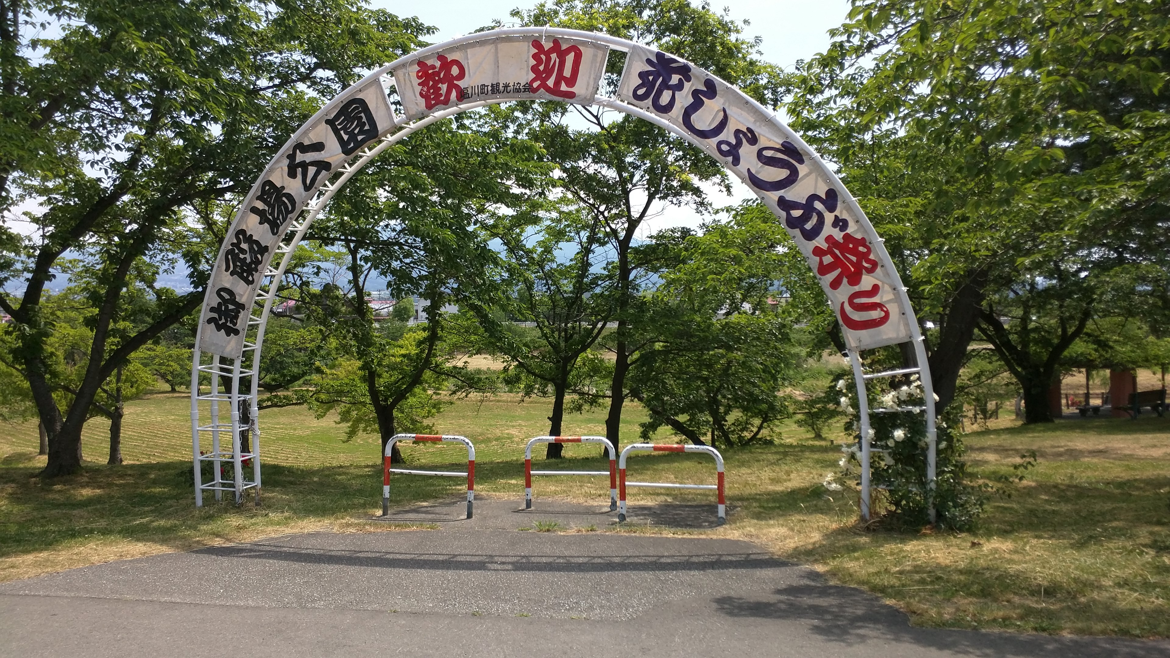 喜多方市塩川町御殿場公園の入り口